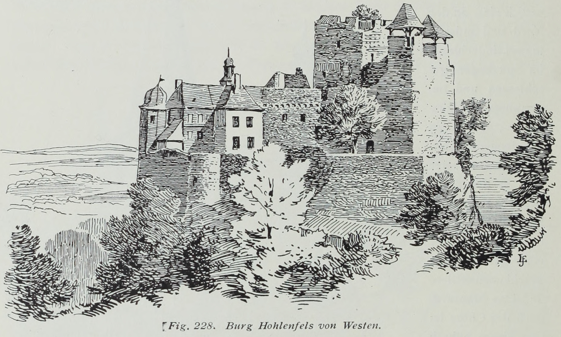 Burg Hohlenfels von Westen